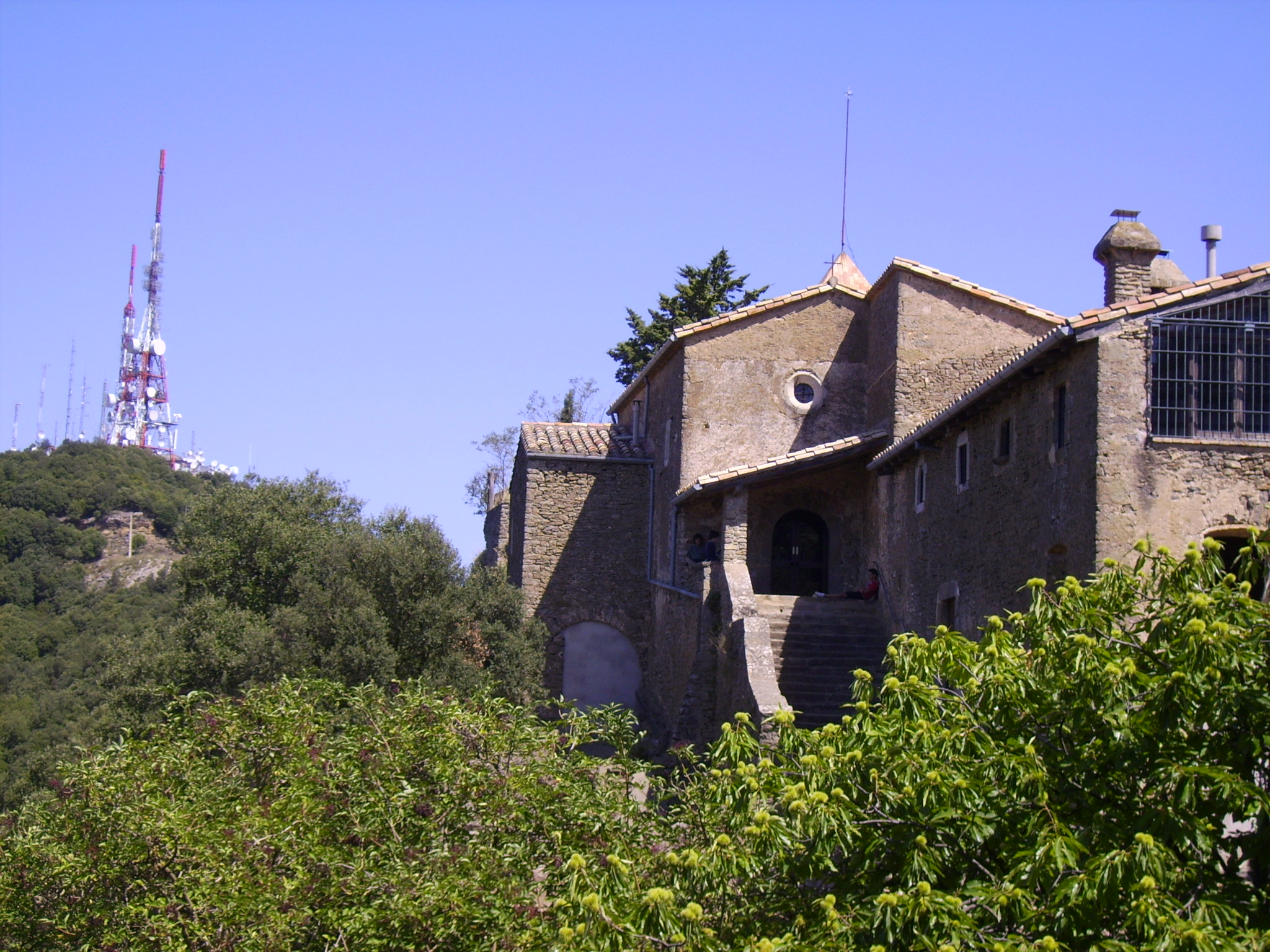 Castell de Rocacorba (Canet d'Adri)